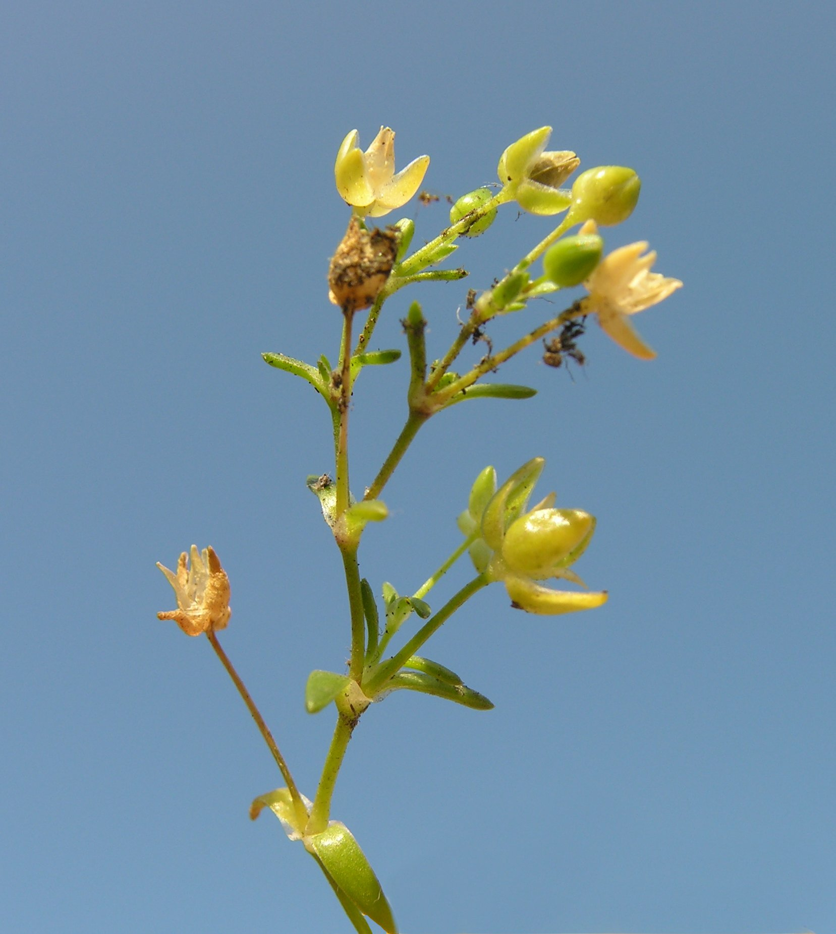 Sagina maritima